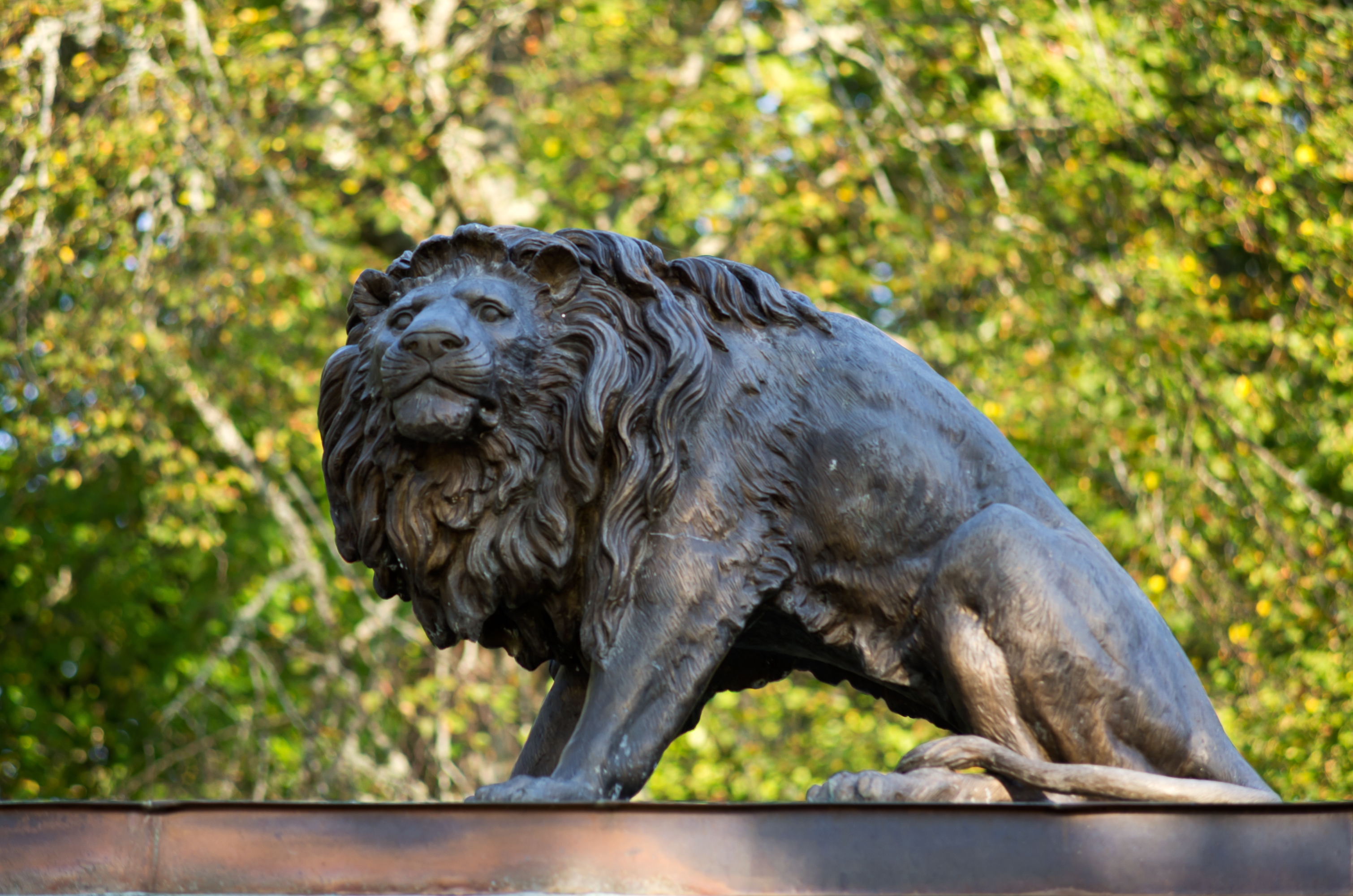 Mäksa mõis, lõviskulptuurid väraval